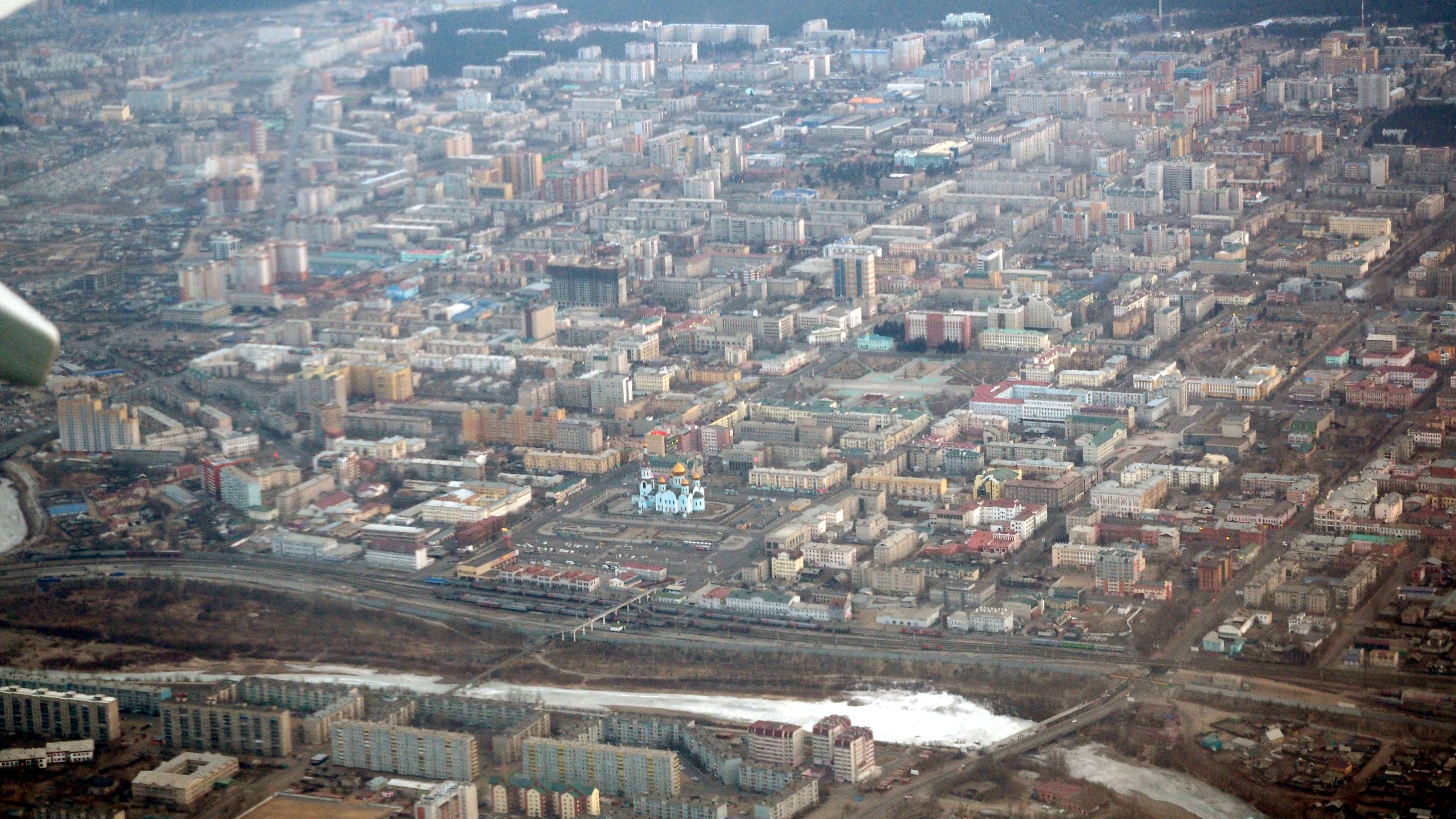 Вид на Читу из самолёта